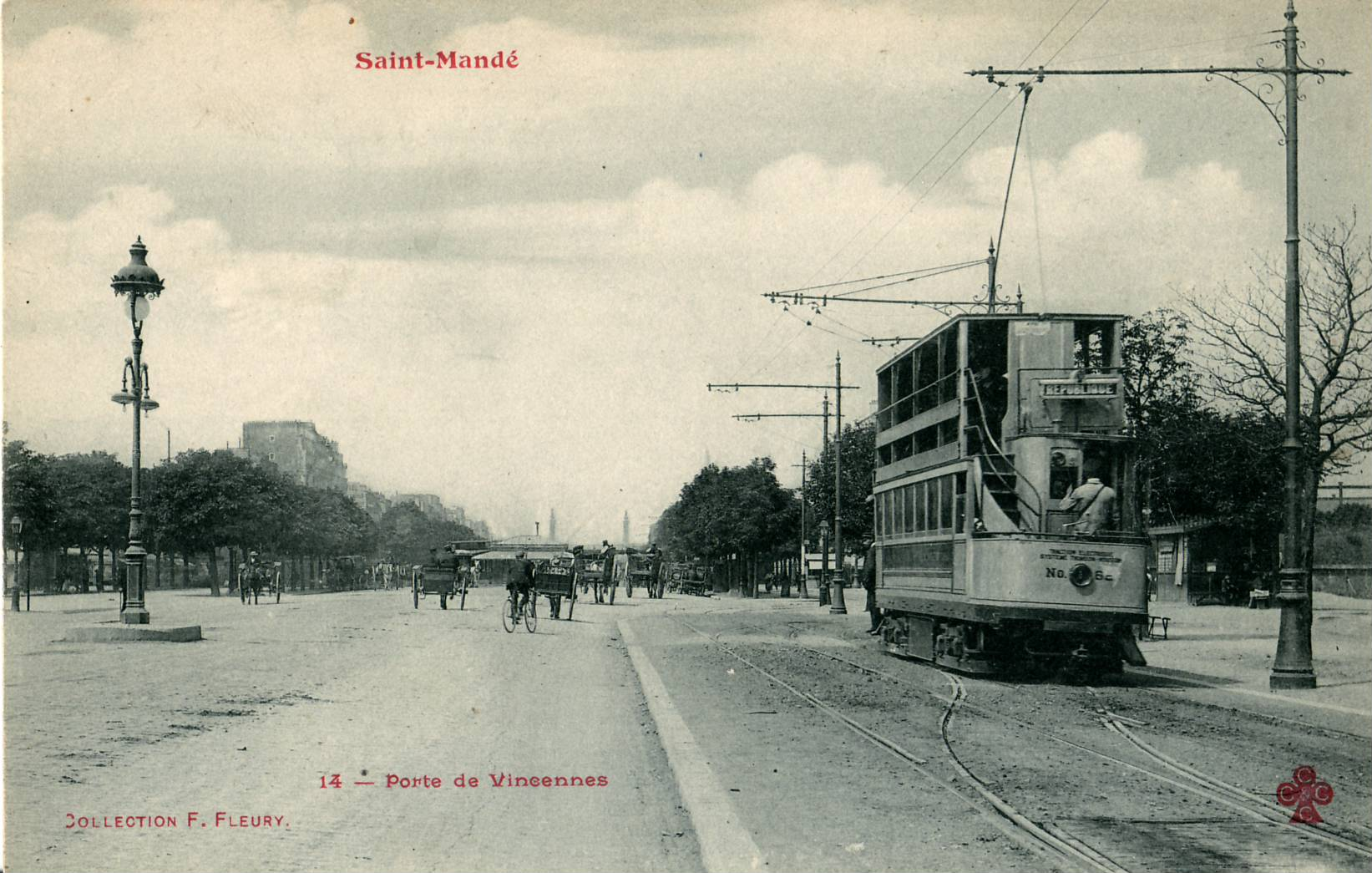 Carte postale ancienne éditée par FF - Fleury N°14 Saint-Mandé : La Porte de VincennesVue d'un tramway à impériale des Nogentais. Au fond, les Colonnes du Trône